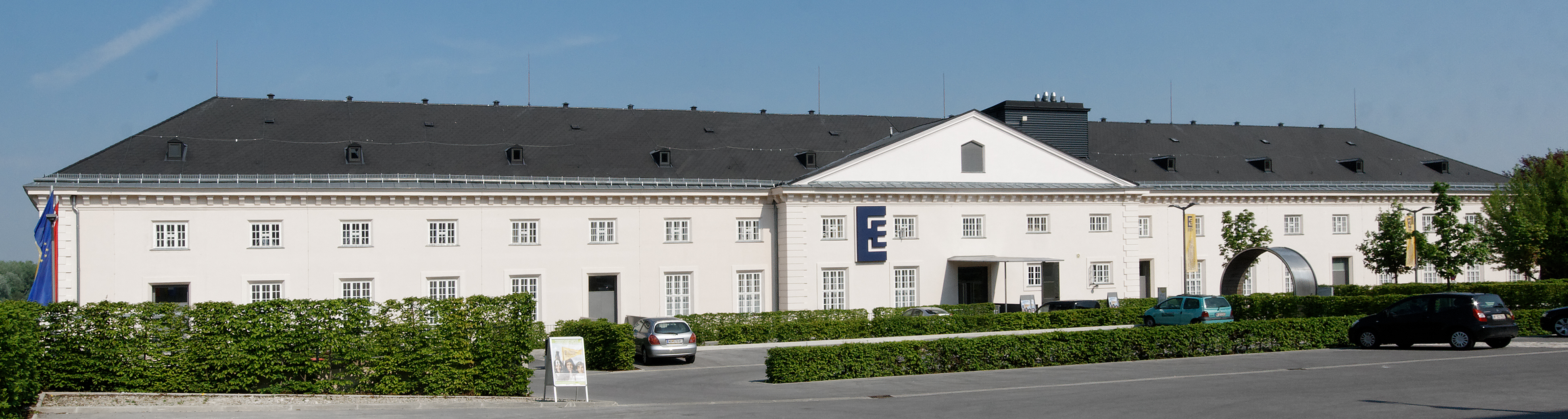 Kulturfabrik Hainburg während der Niederösterreichischen Landesausstellung 2011, Blick zum Eingang.